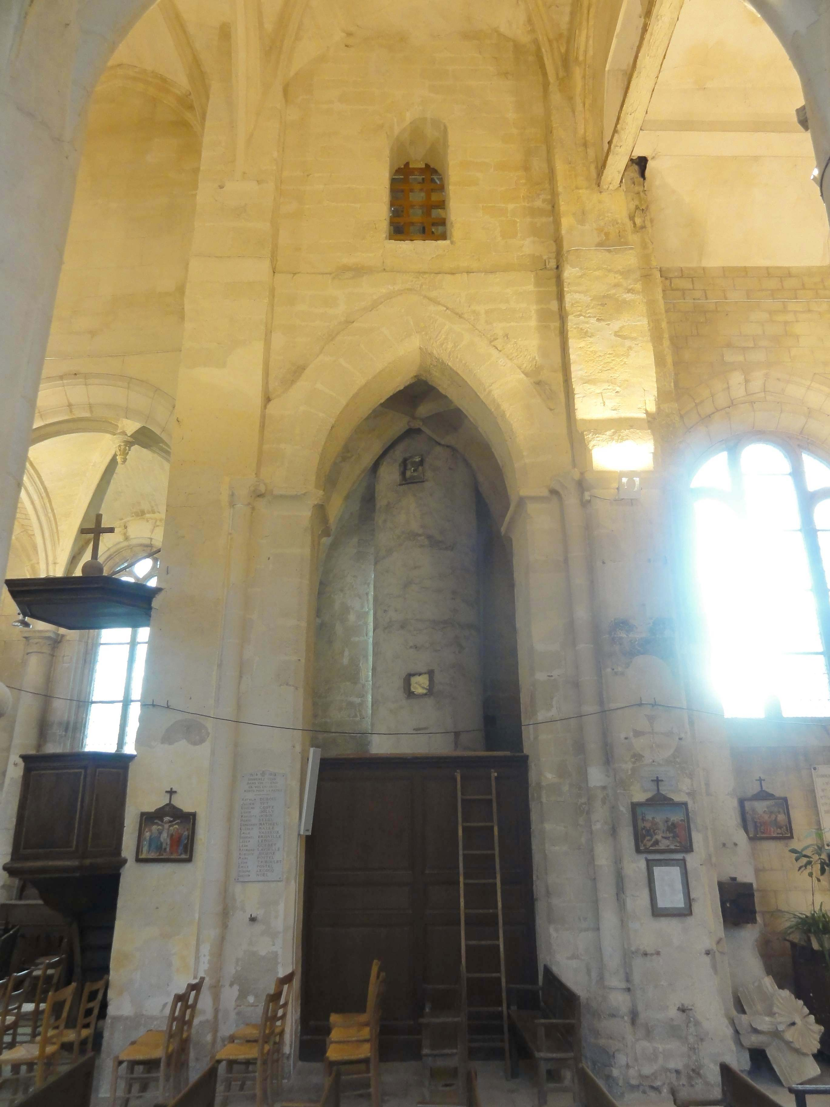 Nef, 4e travée, élévation sud (clocher et sacristie).